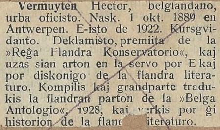 Gazetartikoleto (el la Felixarchief (arĥivaĵo 2233-267) de Antverpeno) pri Hector Vermuyten